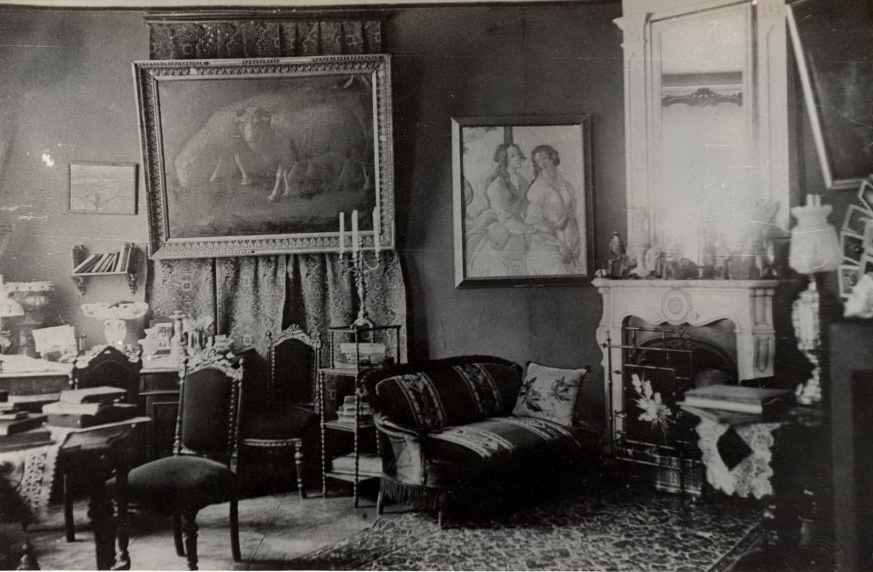 Беларуская (тарашкевіца): Горадня (Horadnia), дом Элізы Ажэшкі (Eliza Ažeška)